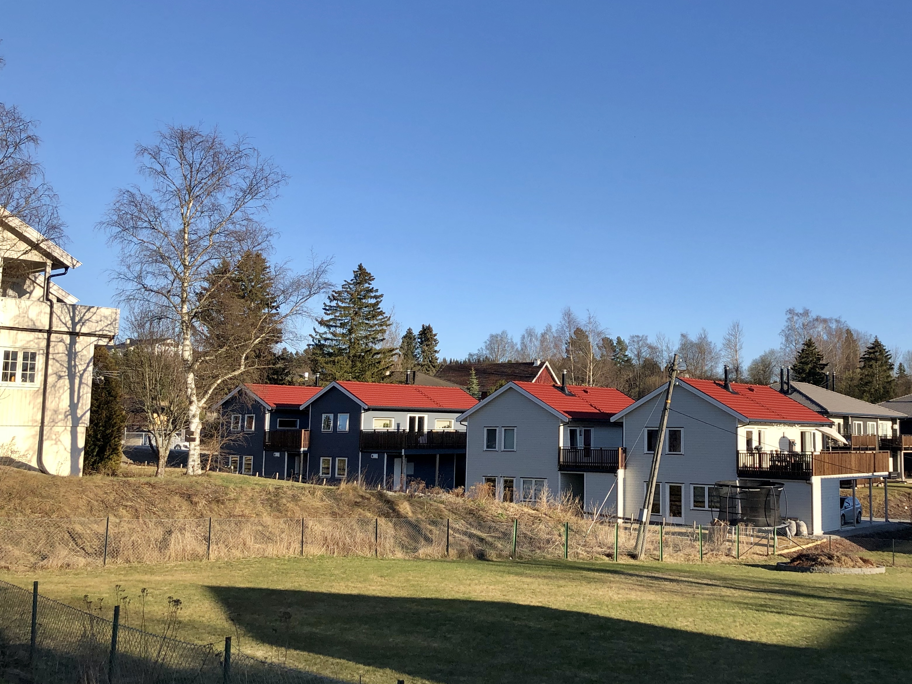 Kjelstadveien 19-21-23-25, Ringerike